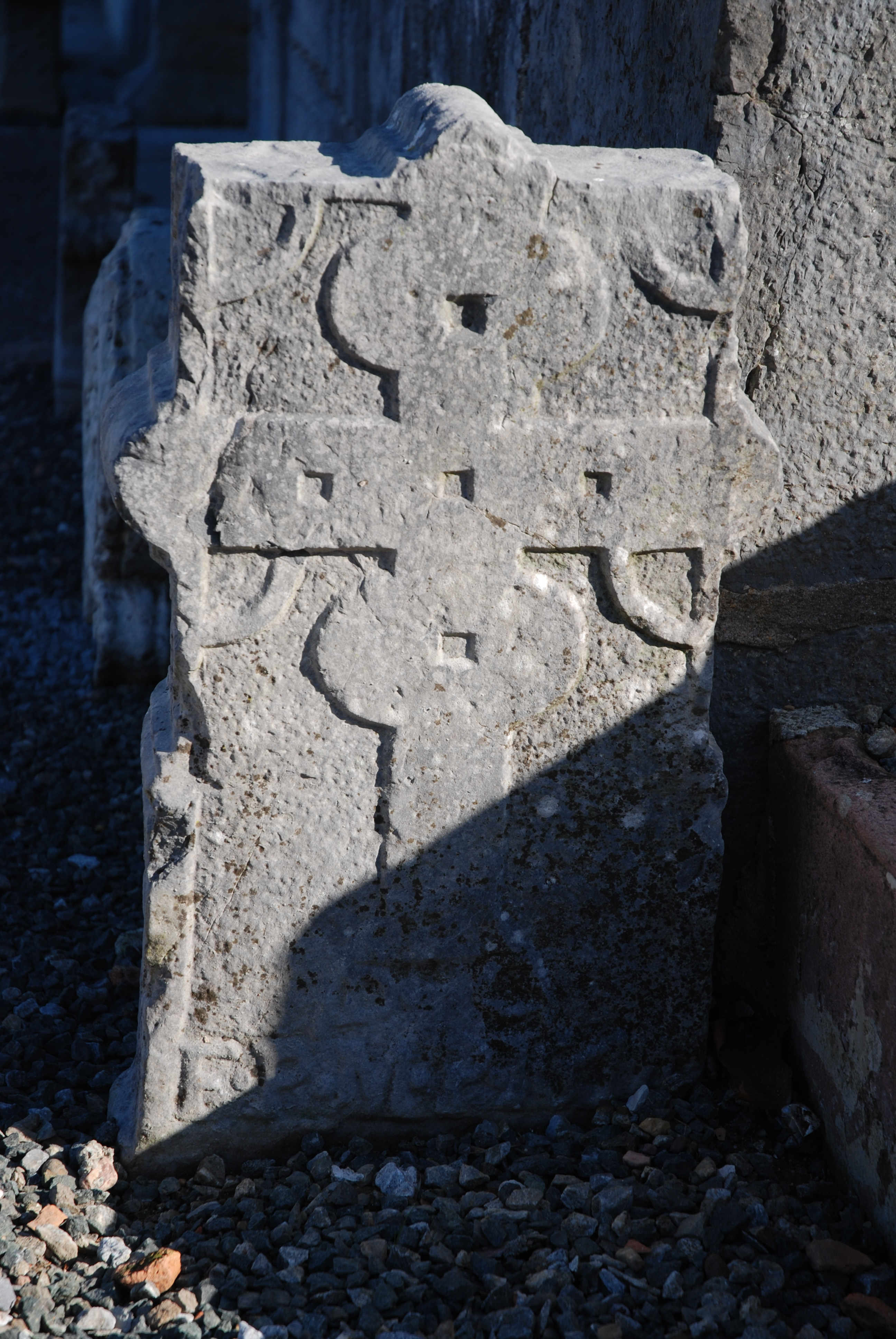 Itxassou, stèle basque